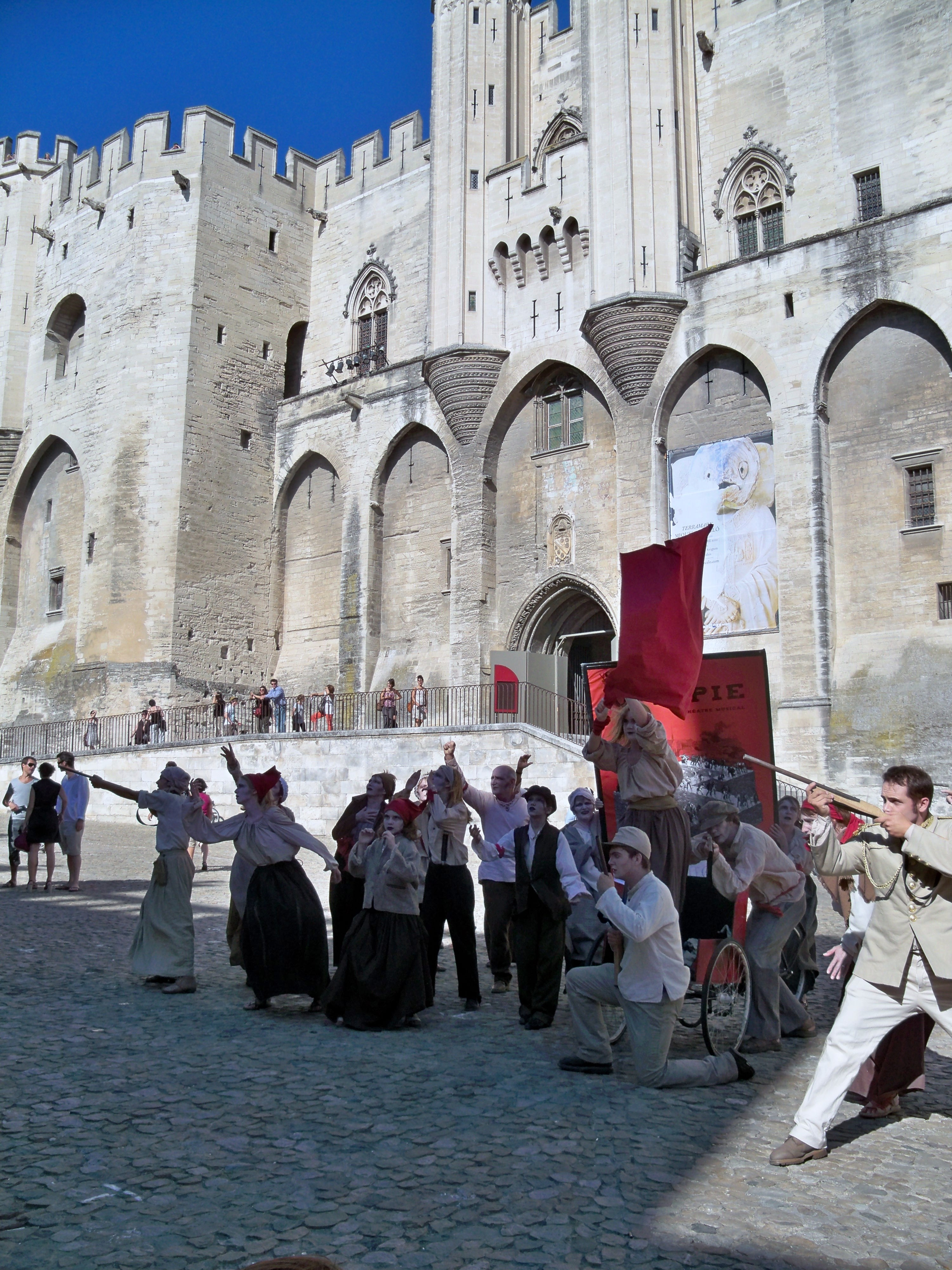 parade de la troupe Utopia, lors du Festival d'Avignon 2010